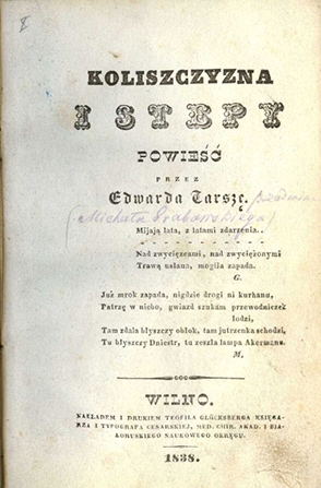 Okładka powieści "Koliszczyzna i stepy.jpg"